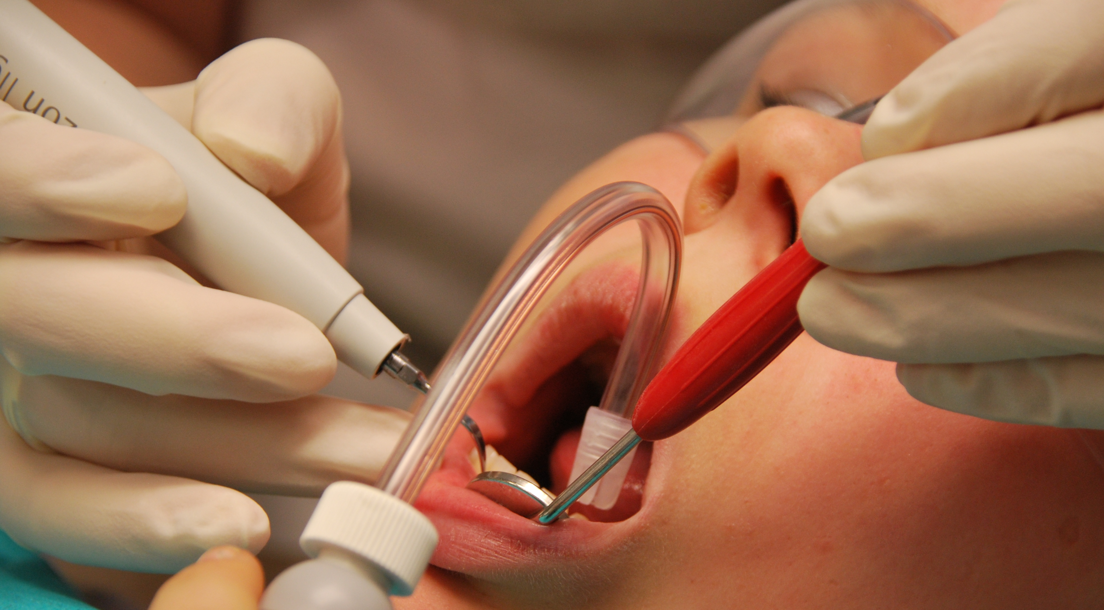 Dentalni hygiena - osetreni ultrazvukem